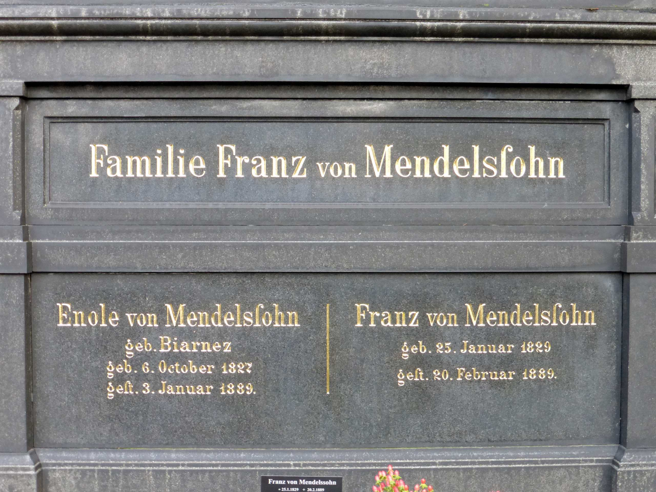 Deitsch: Grabstätte von Franz von Mendelssohn dem Älteren auf den Friedhöfen am Halleschen Tor